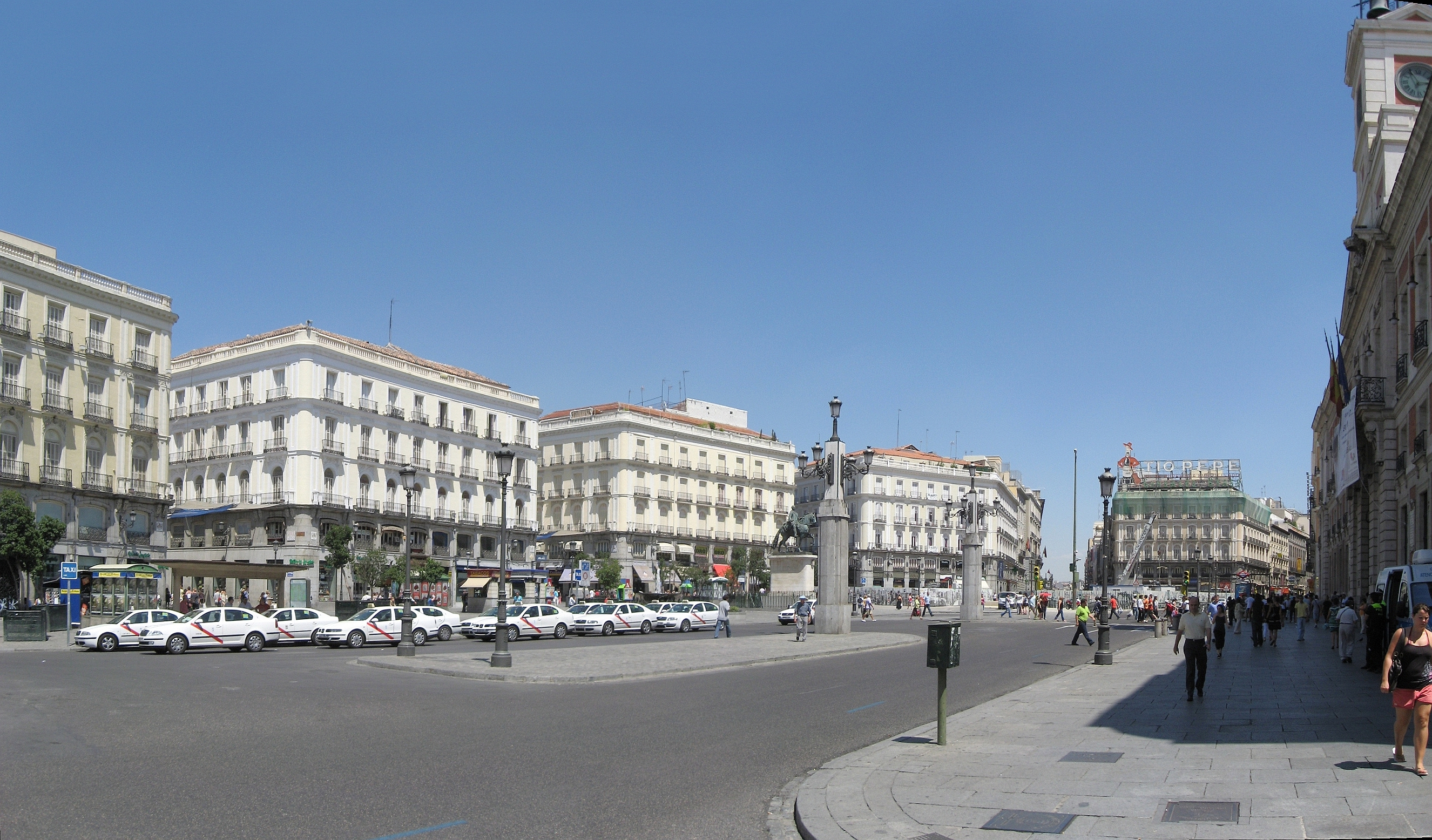 Puerta del Sol Madrid